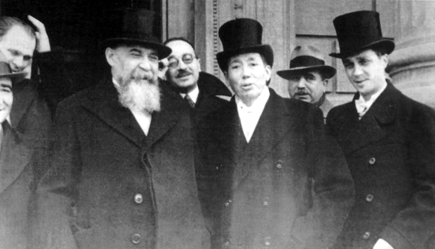 Nicolae Iorga, Nicolae Titulescu şi Savel Rădulescu la ieşire de la Camera Deputaţilor.